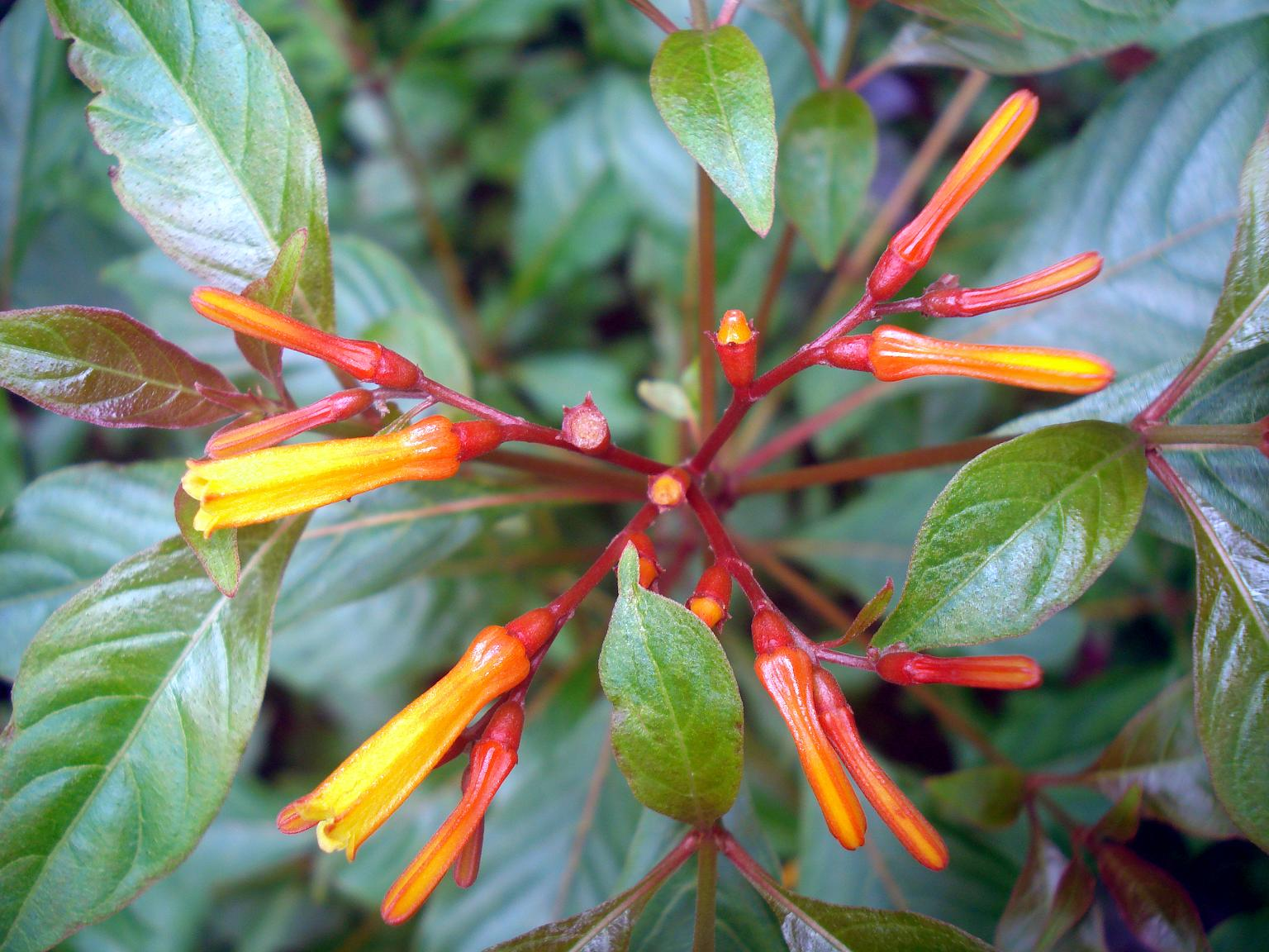 Name: Hamelia patens Family: Rubiaceae പുന്തോട്ടങ്ങളിലും പുരയിടങ്ങളിലും വളരുന്ന നിത്യഹരിത കുറ്റിച്ചെടിയാണ് ഹെമീലിയ. ചുവപ്പും ഓറഞ്ചും കലർന്ന കൊച്ചു പൂക്കൾ ഈ ചെടിയിൽ ഉണ്ടാവുന്നു.